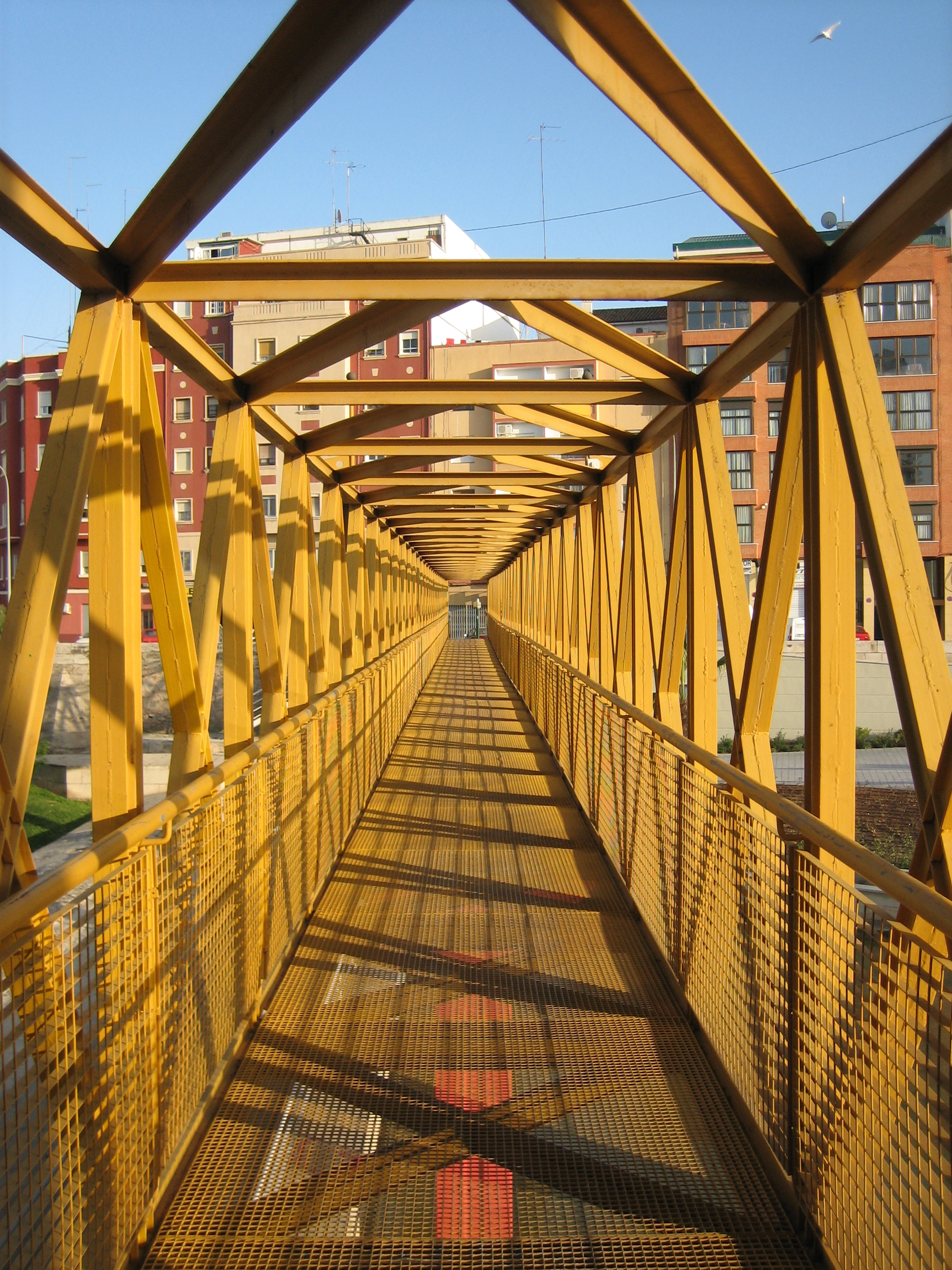 Valencia